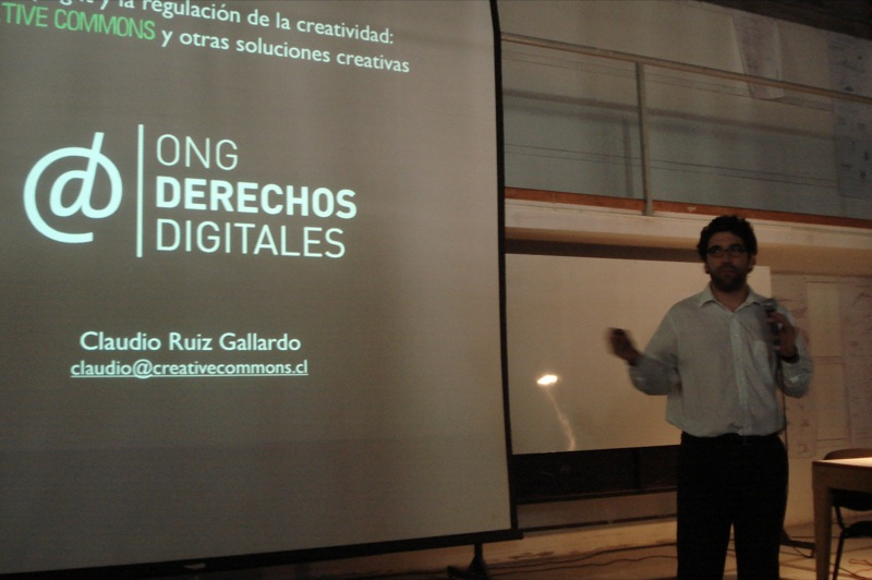 Claudio Ruiz, exponiendo por la ONG Derechos Digitales.